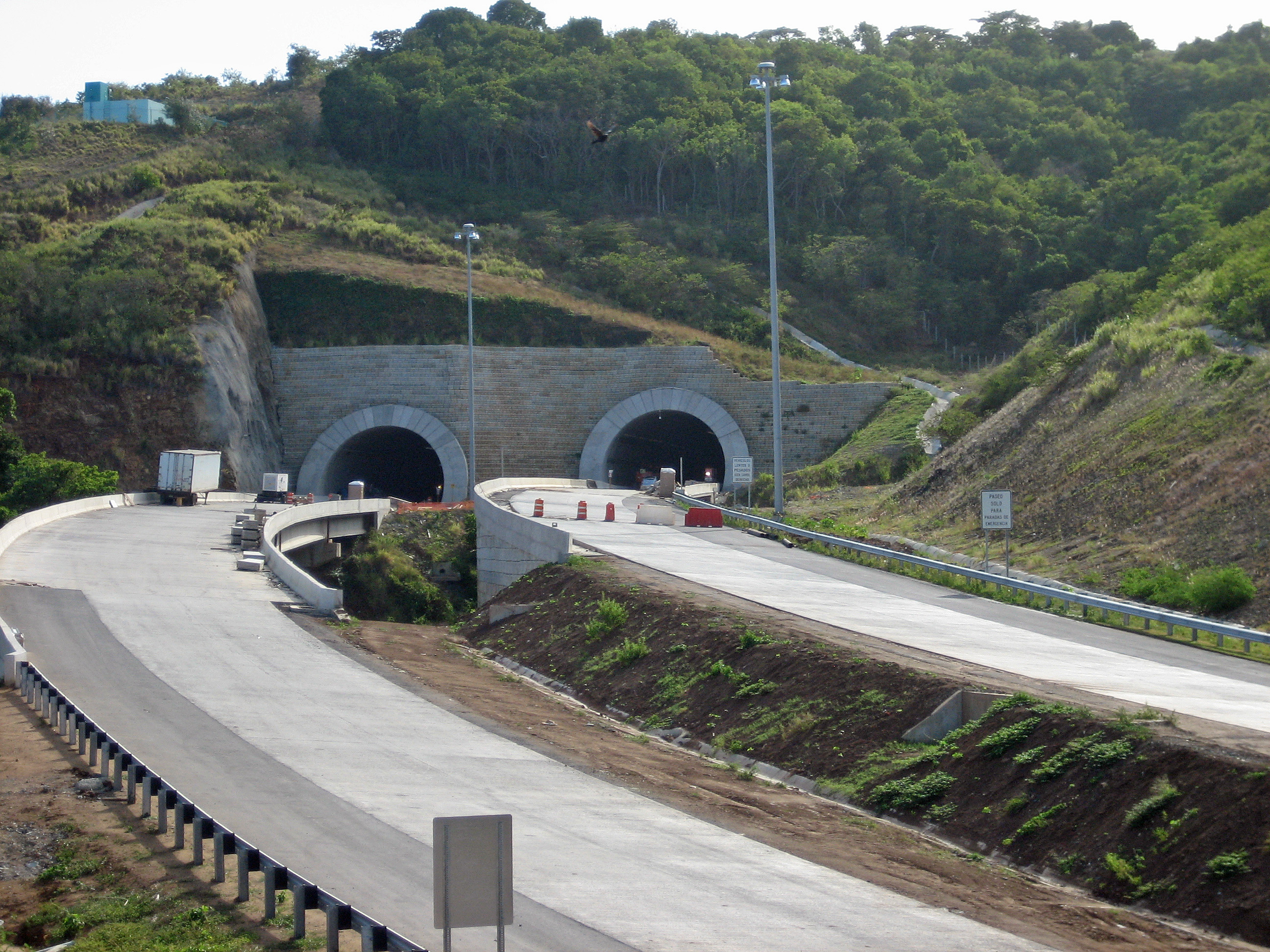 Túnel en construcción, Maunabo, Puerto Rico